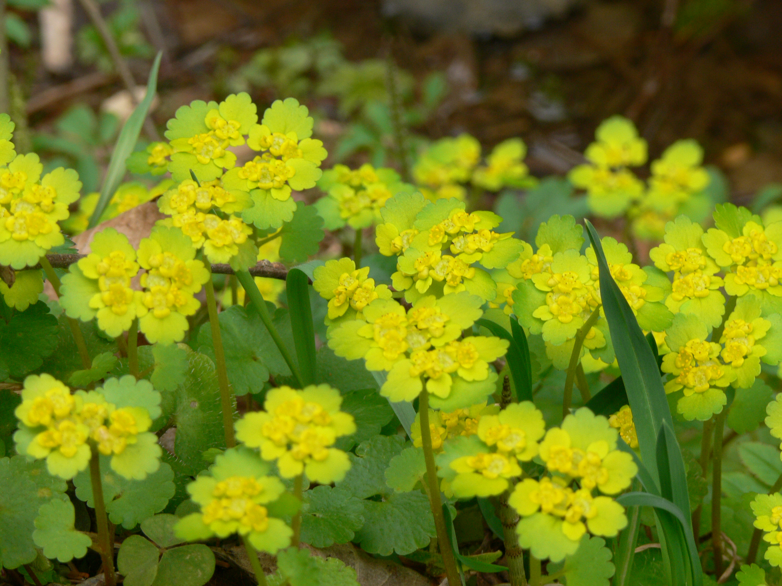 Leevaku, Põlvamaa